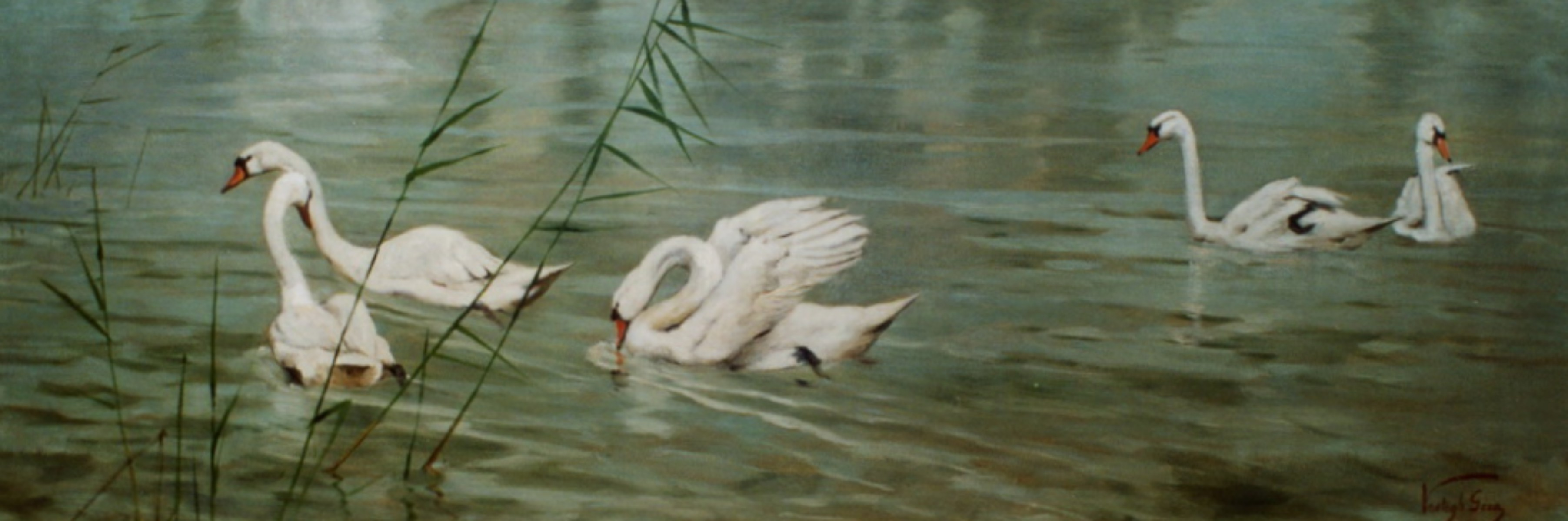 Vastagh Géza: Hattyúk